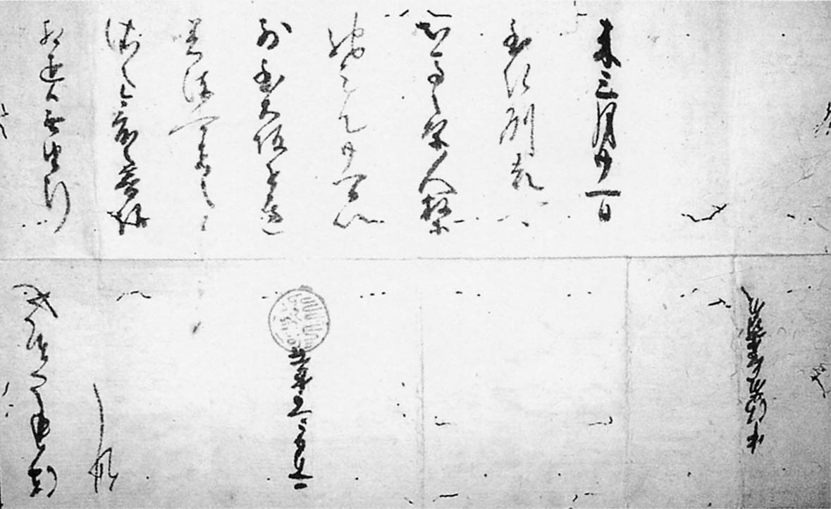 羽柴秀吉朱印状